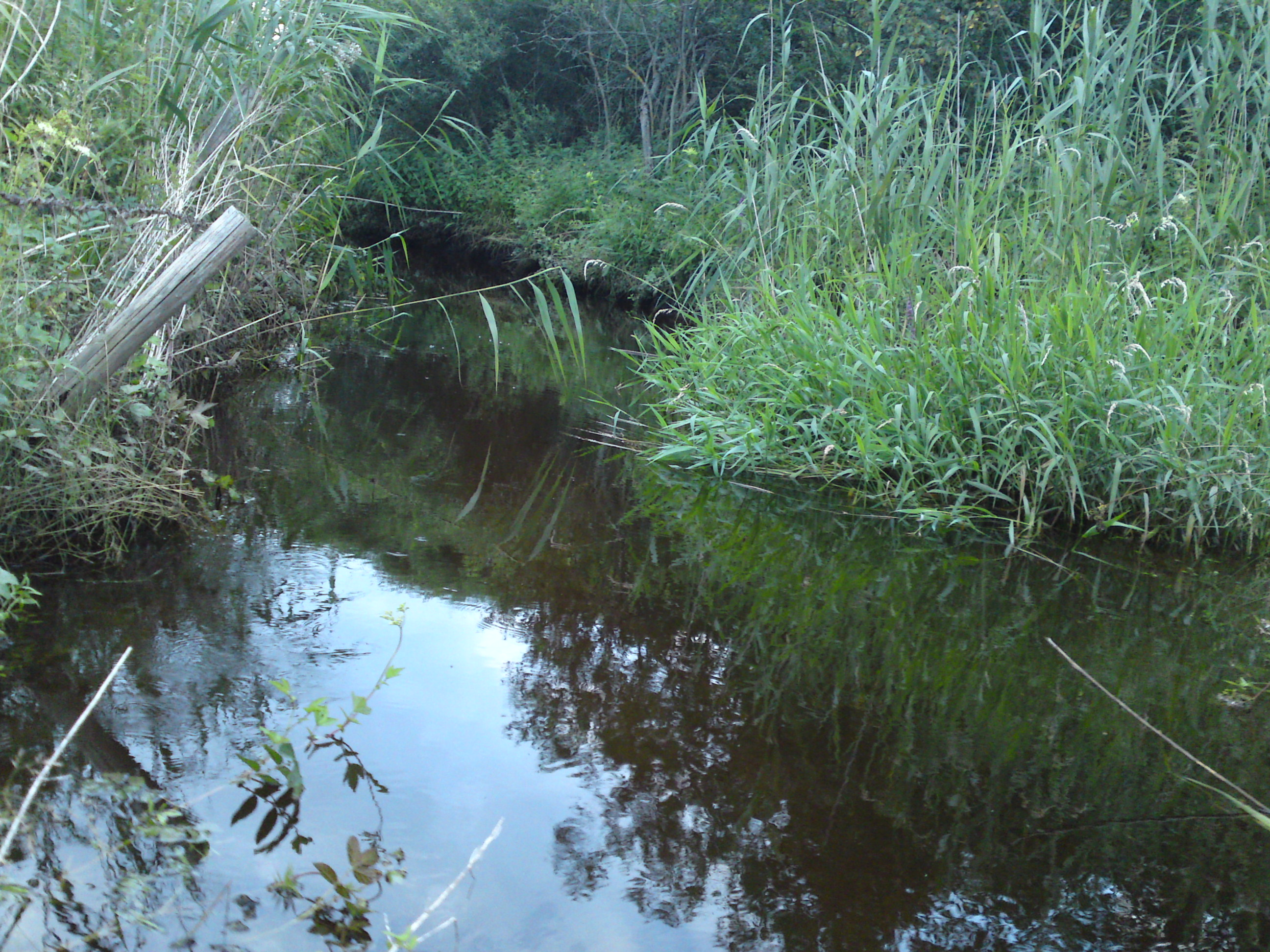 Die Gennach bei der Mooshütte im Gennachmoos, Nordöstlich von Biessenhofen